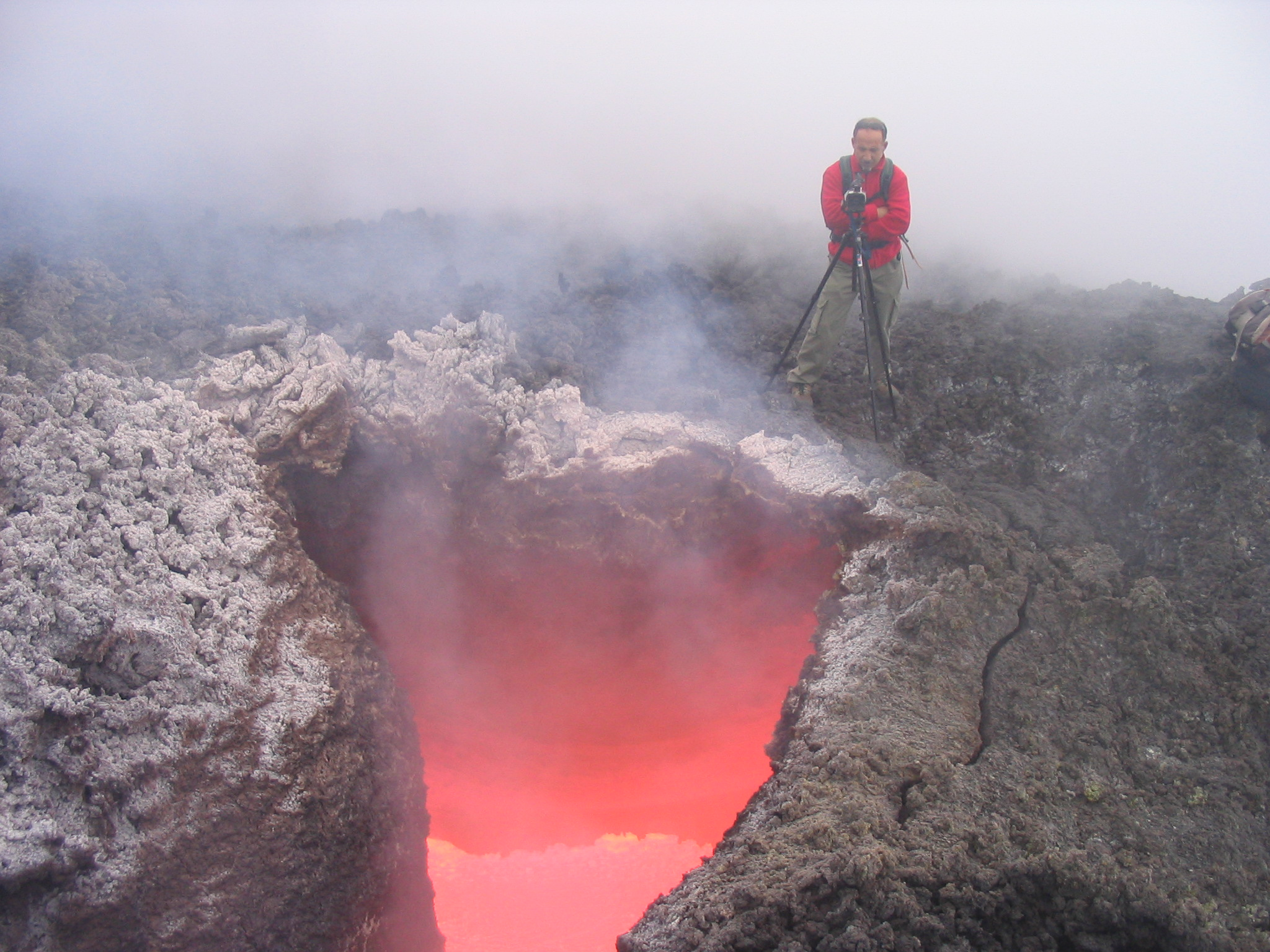 Franco Zanghi durante le riprese per documentario sull'Etna